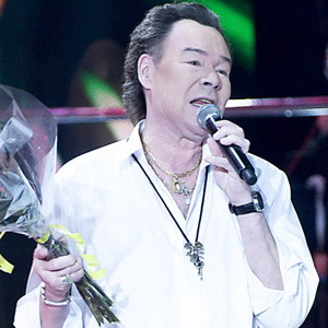 Михаил Муромов на восьмом фестивале «Дискотека 80-х» в ноябре 2009 года